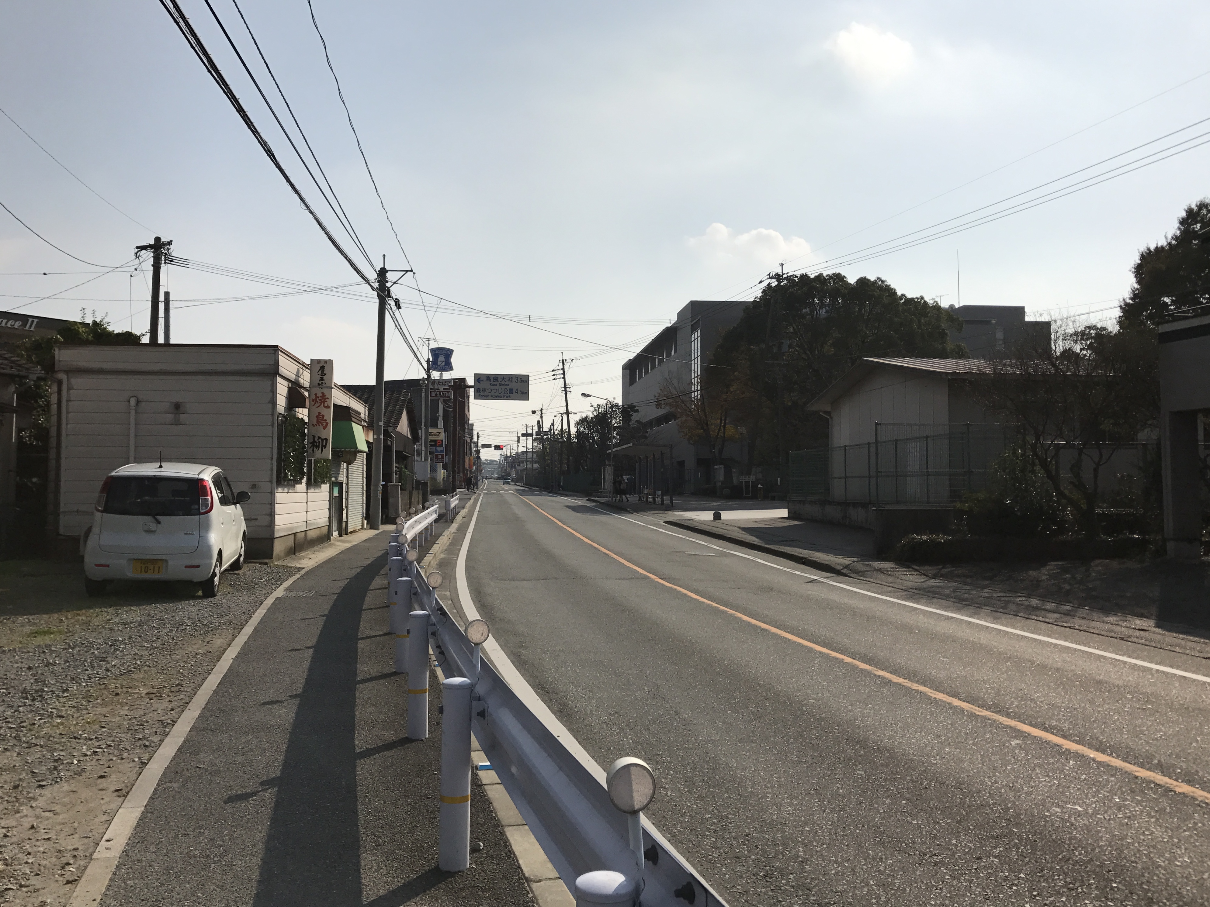 久留米市立南筑高等学校付近の福岡県道800号